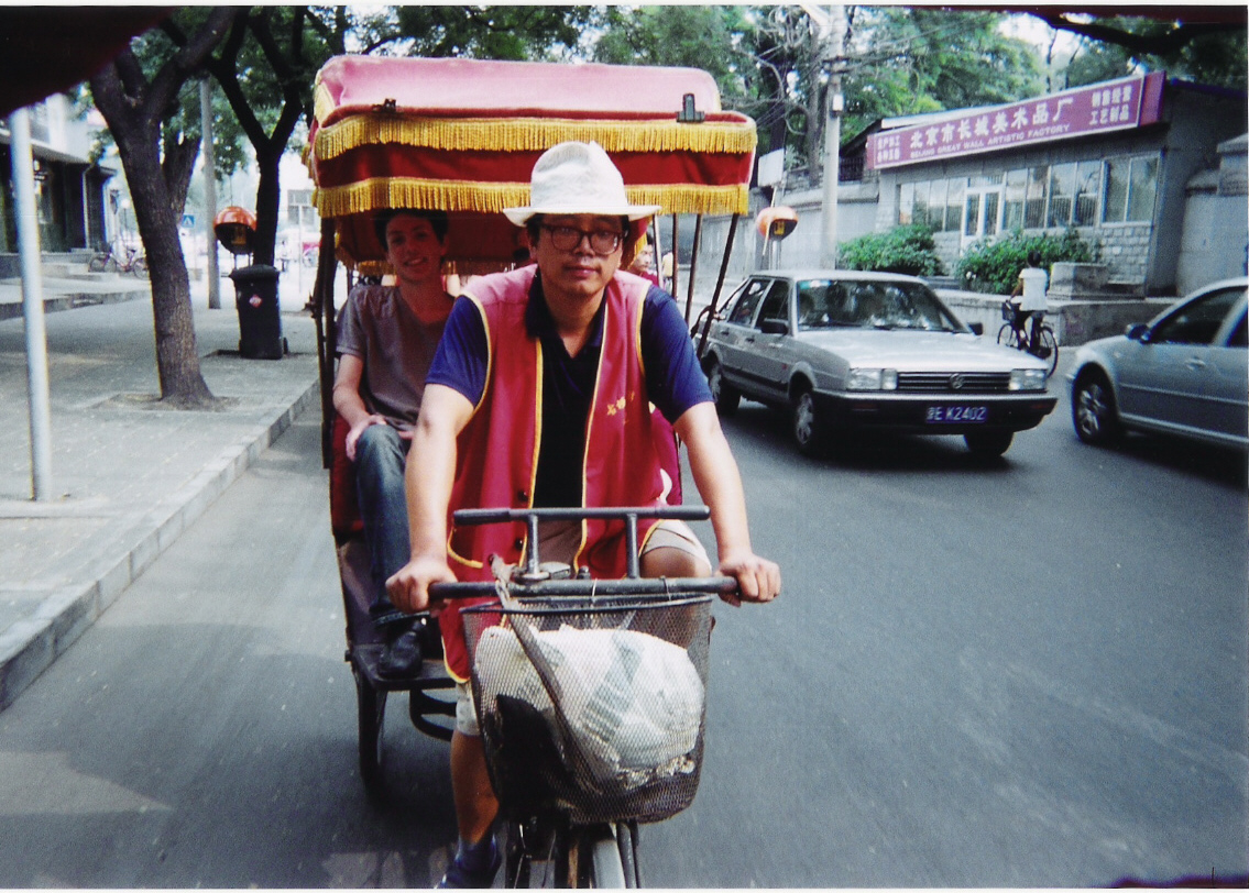 Cyclopousse à Beijing.